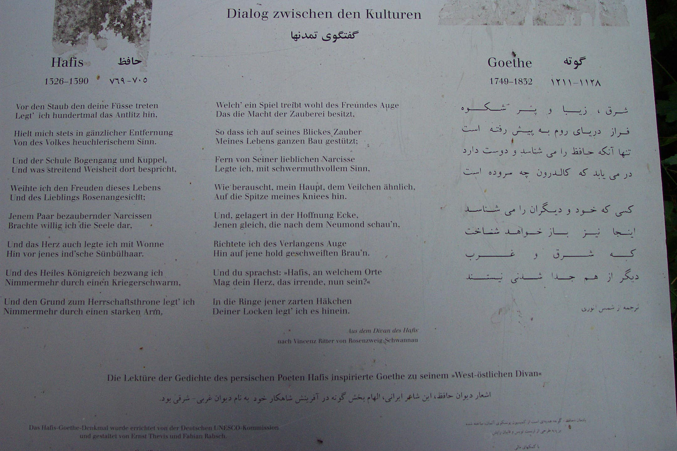 Tafel, die an der Seite des Hafis-Goethe-Denkmals zu Weimar, Thüringen, angebracht ist.